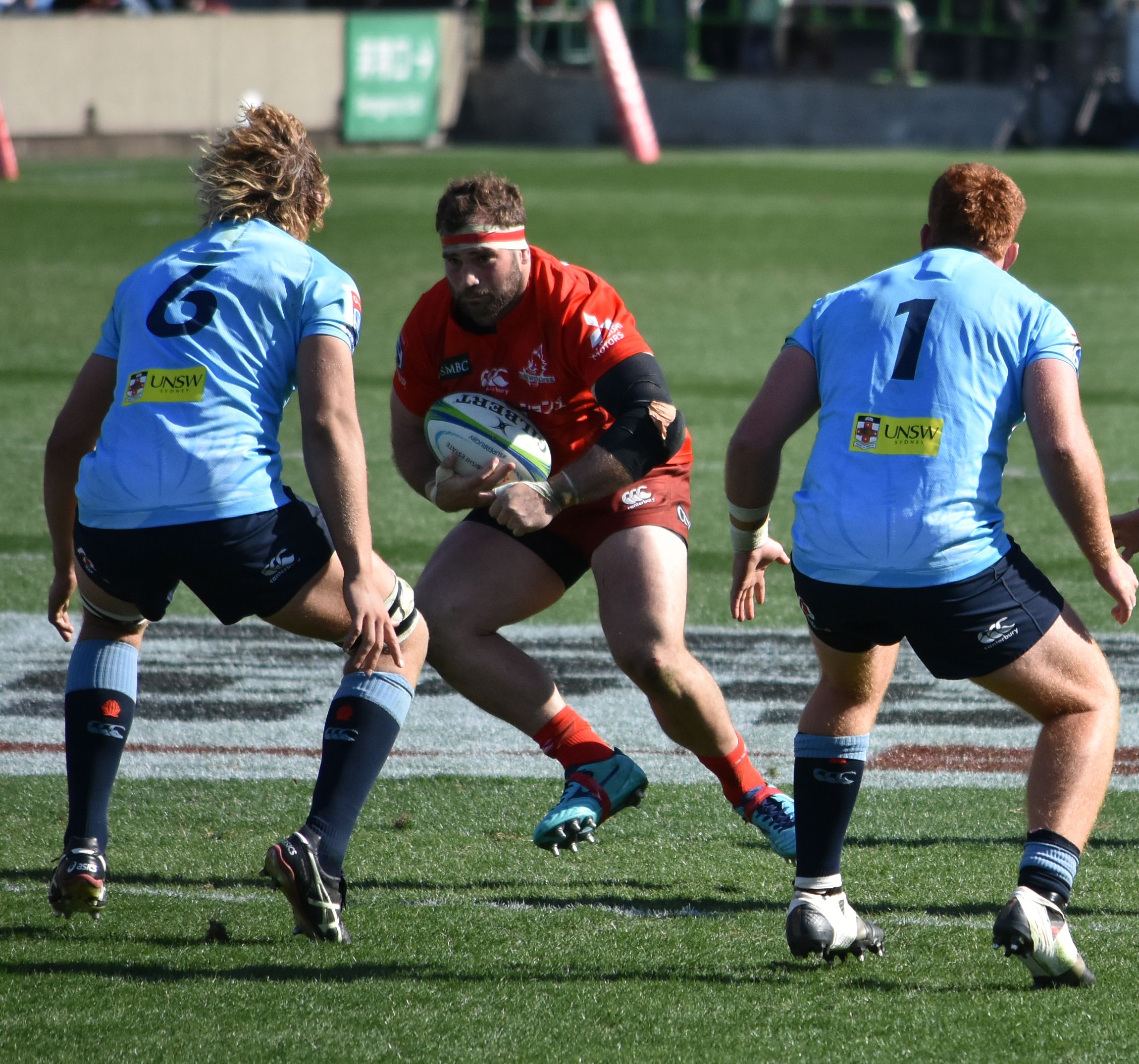 クレイグ・ミラー。秩父宮ラグビー場にて。 Nikon D3400